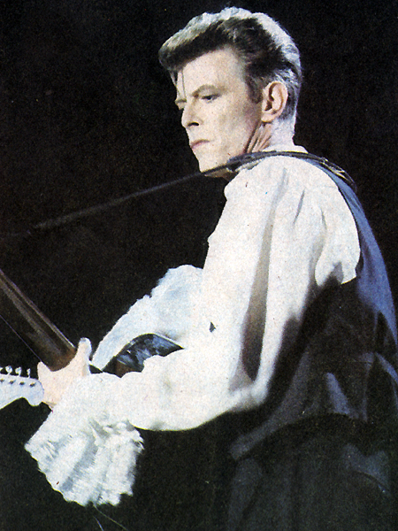 David Bowie sobre el escenario del festival "Rock in Chile", realizado en el Estadio Nacional de Chile, 27 de septiembre de 1990.